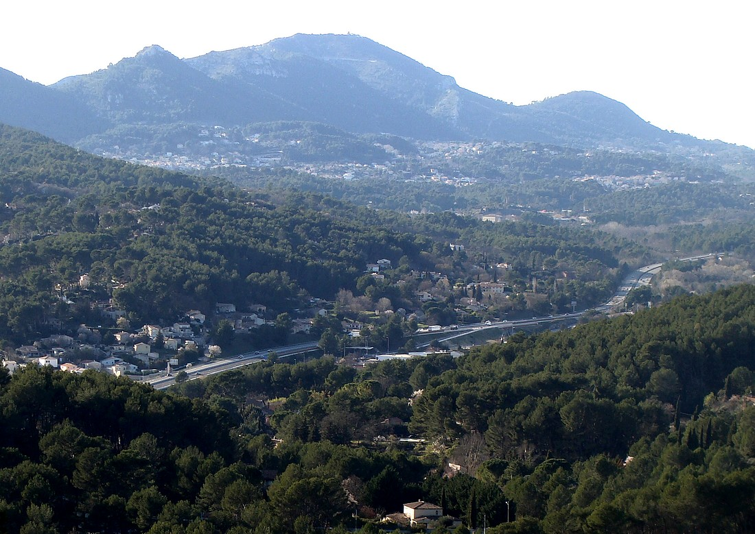 La haute vallée du Merlançon (de bas en haut : la Destrousse, Peypin, Saint-Savournin) ; au fond le Grand-Puech (alt. 778 m.)